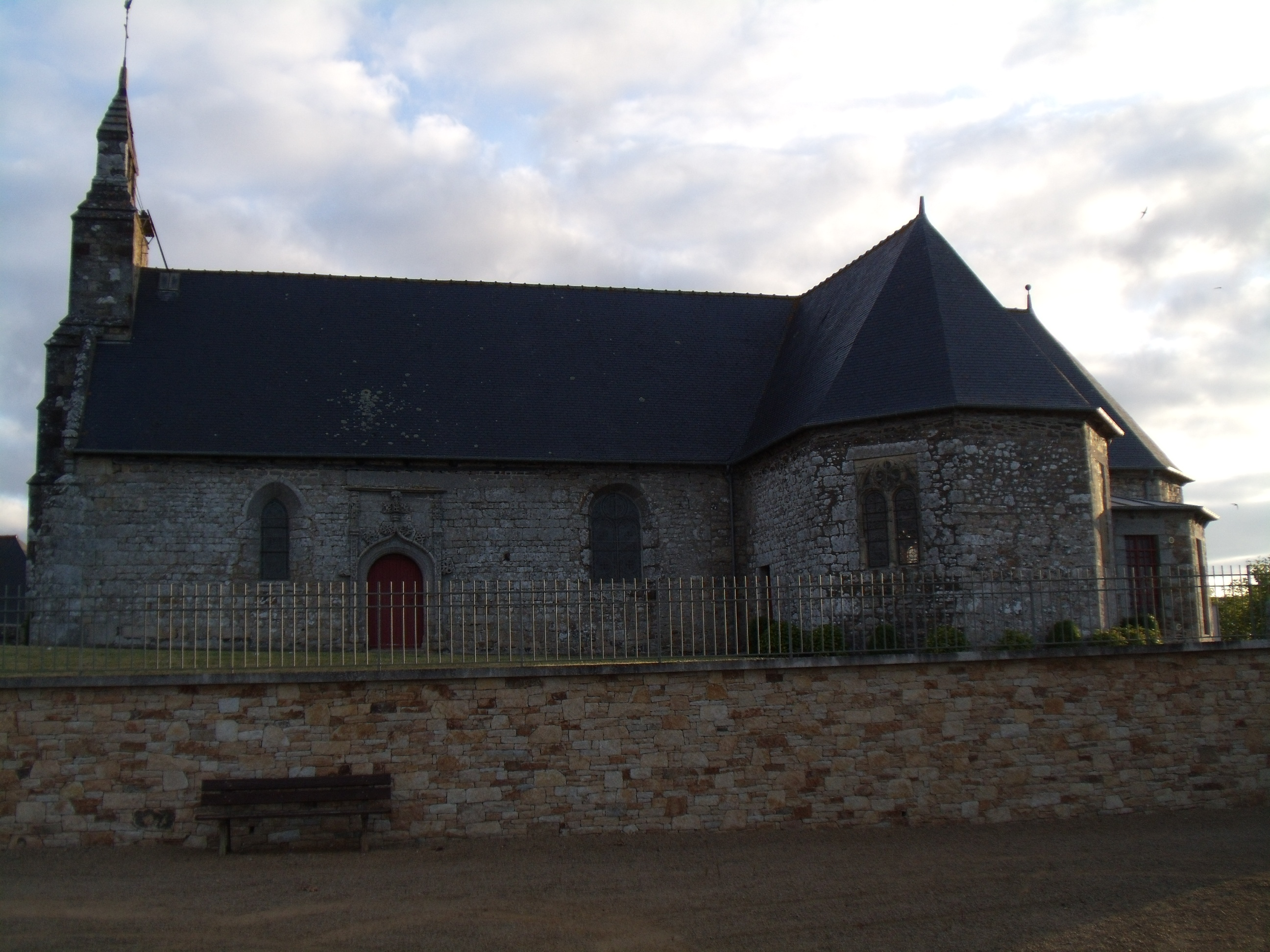 L'église Saint-Pierre et Saint-Paul de Plerneuf